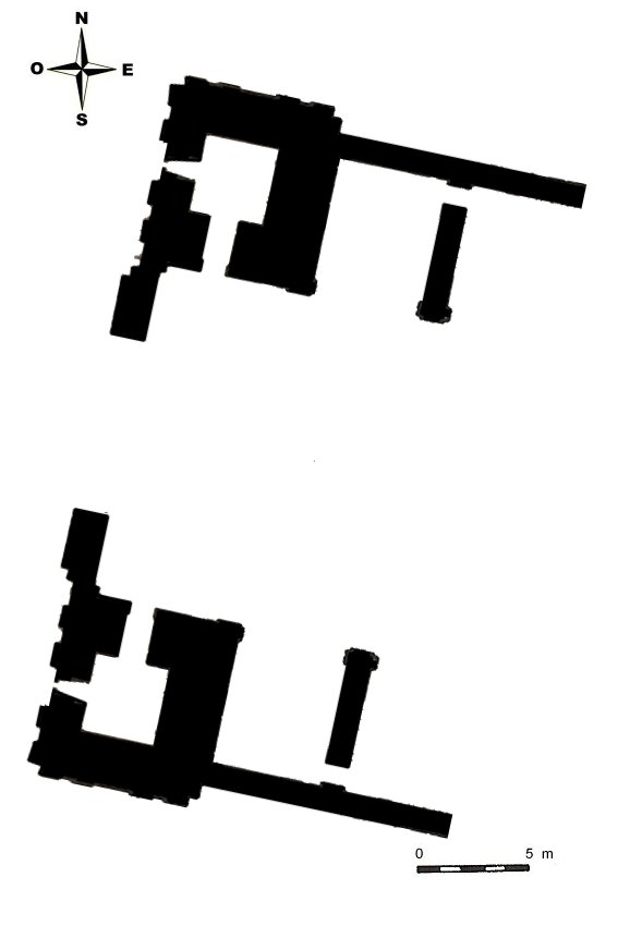 Planta de la part inacabada de l'església del Santuari del Miracle (Riner, Solsonès)